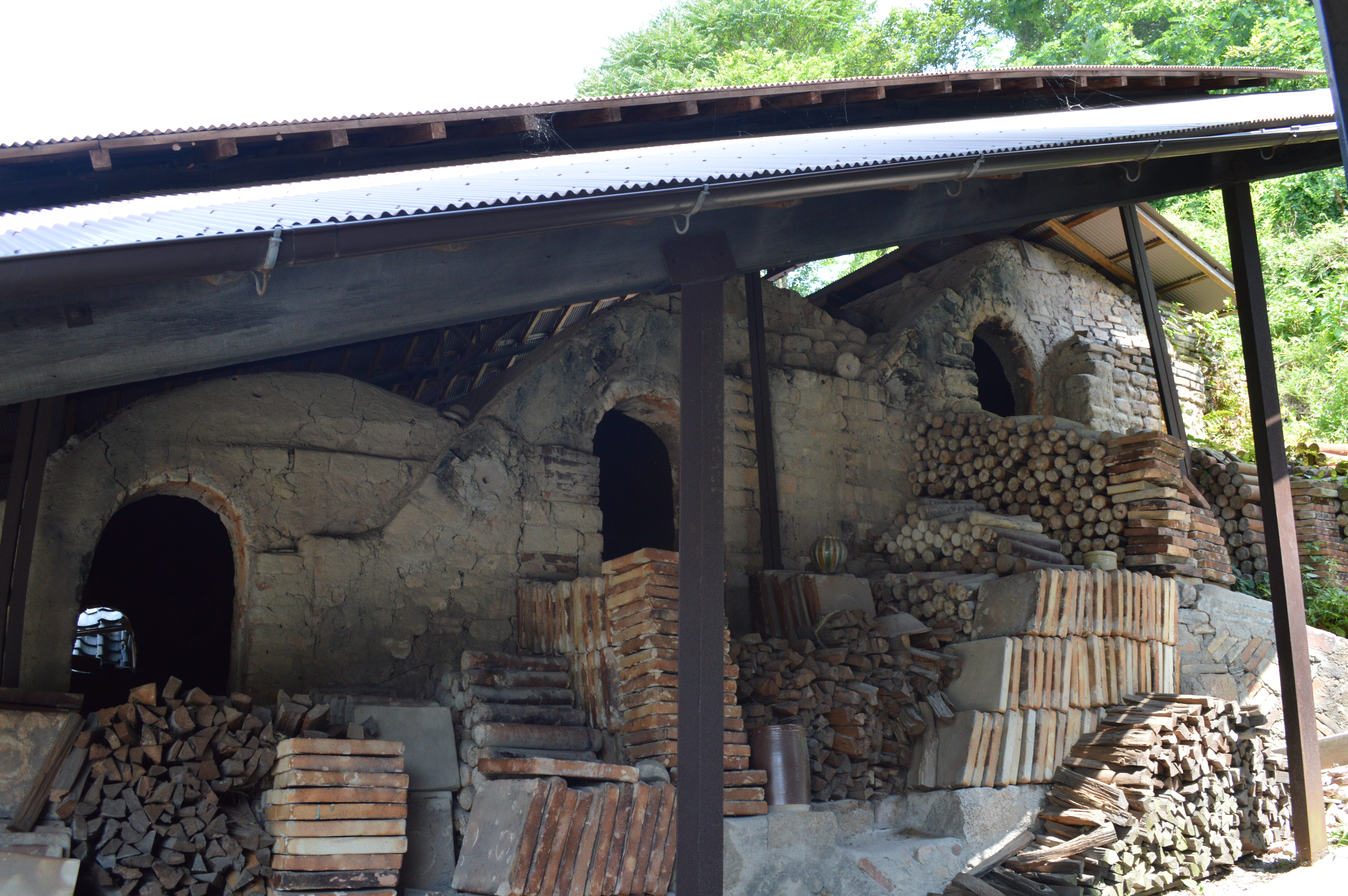 愛知県瀬戸市の散策路「窯垣の小径」にある登り窯。